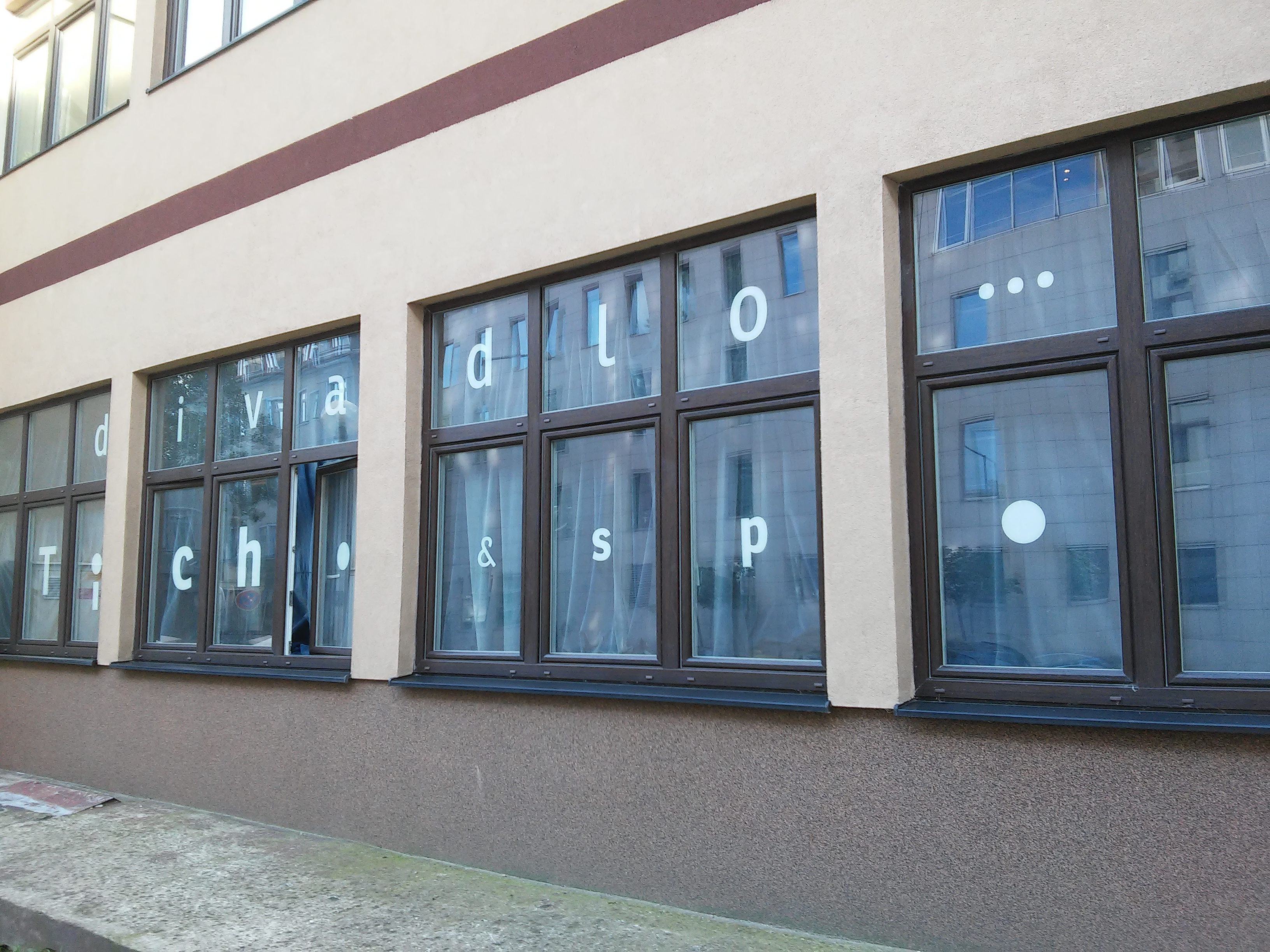 Divadlo Ticho a spol., Školská, Bratislava